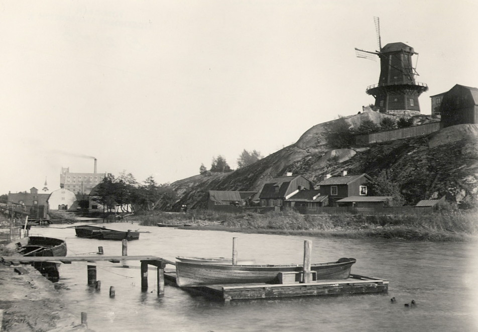 View from Hammarby Lake towards Danviken and the mill Klippan (the Rock). Vy från Hammarbysjön mot Danviken och kvarnen Klippan. Parish (socken): Stockholm Province (landskap): Södermanland Municipality (kommun): Stockholm County (län): Stockholm Photograph by: Carl Curman Date: c. 1890 Format: Print Persistent URL: Read more about the photo database (in english)